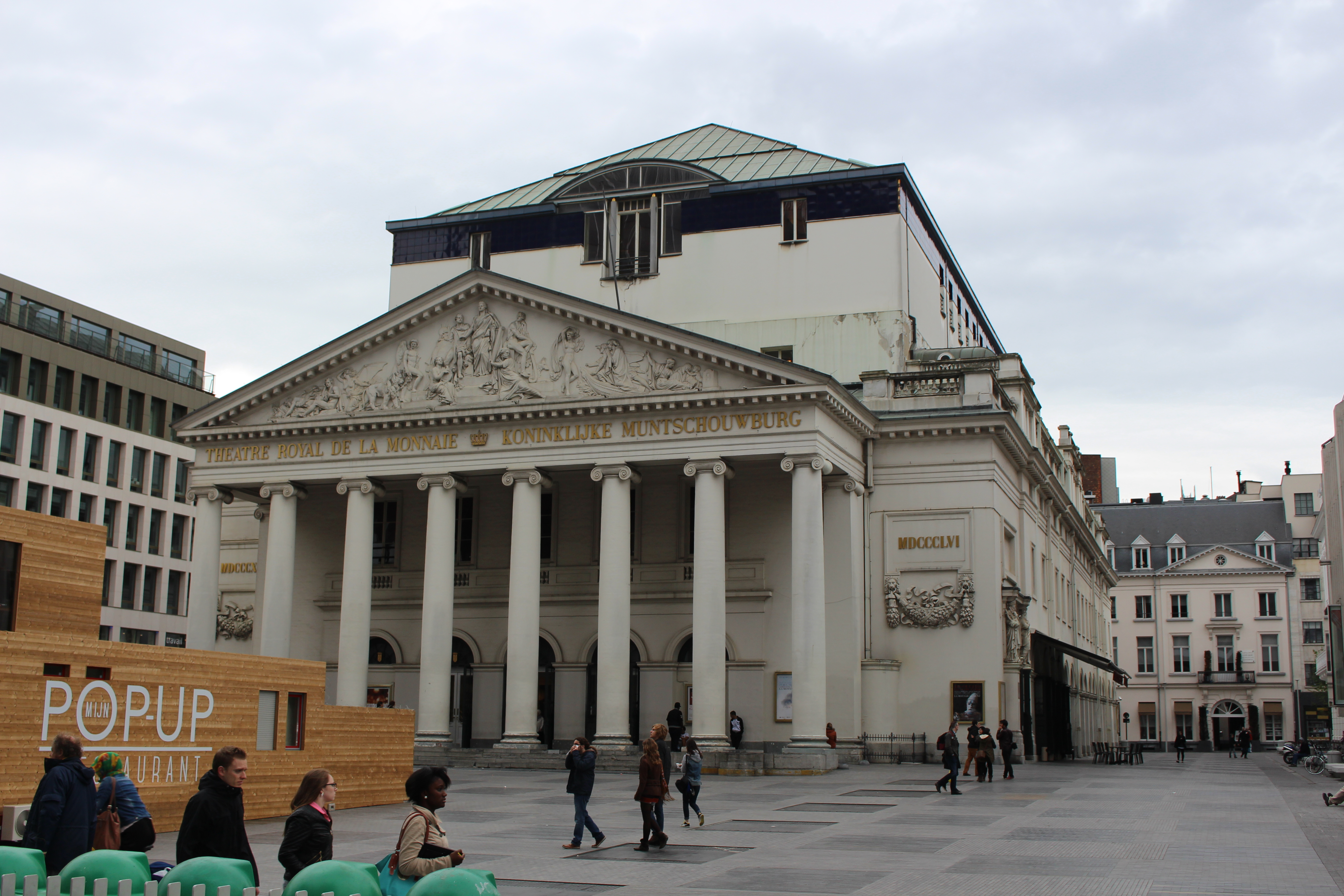 Королевский оперный театр де ла Монне (Theâtre de la Monnaie (La Monnaie), Koninklijke Muntschouwburg (De Munt))